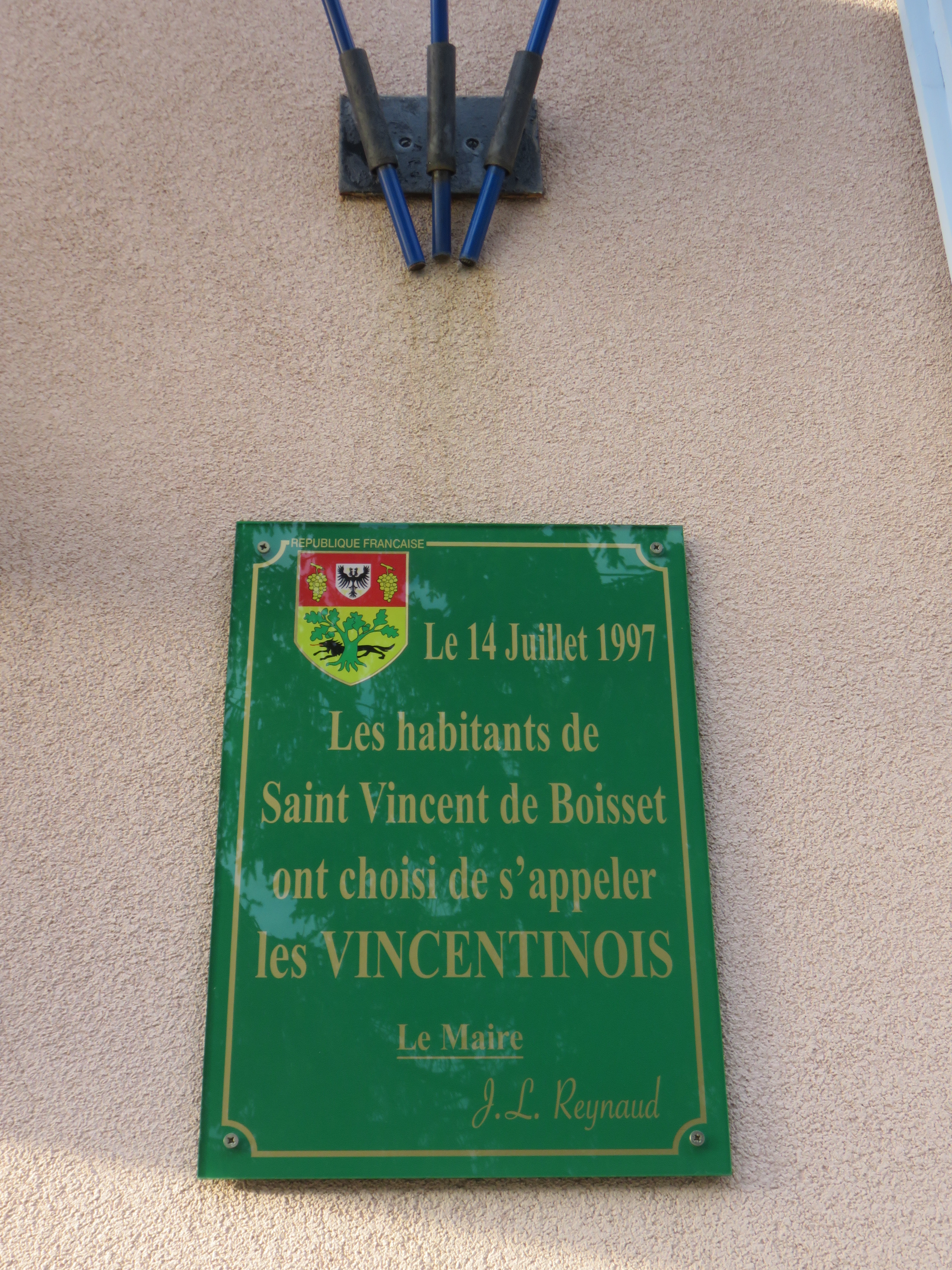 Plaque commérative du choix des habitants de leur gentilé, à Saint-Vincent-de-Boisset (Loire, France) en février 2018.